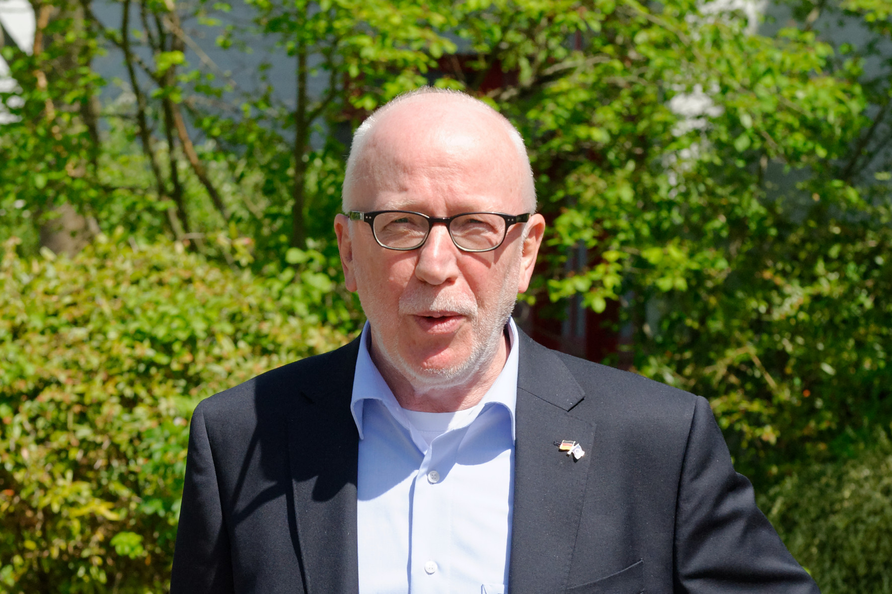 Wolfram Kuschke am Freiherr vom Stein-Gymnasium Leverkusen anlässlich des Europatages 2015